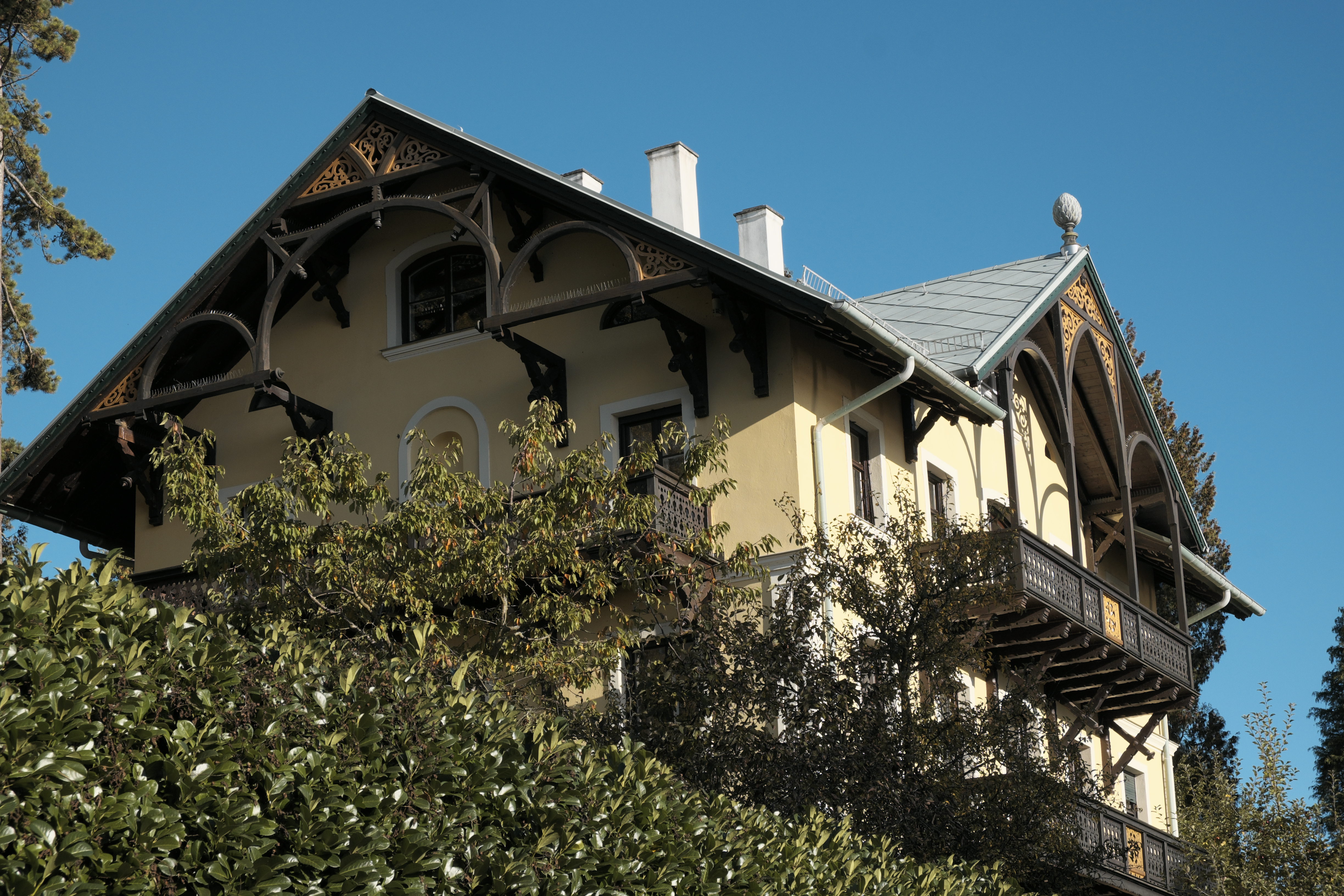 Landhaus in der Seestraße 18 in Unterschondorf (Schondorf am Ammersee) im Landkreis Landsberg am Lech (Bayern/Deutschland)